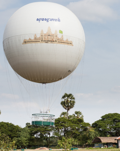 Ballon captif d'Angkor